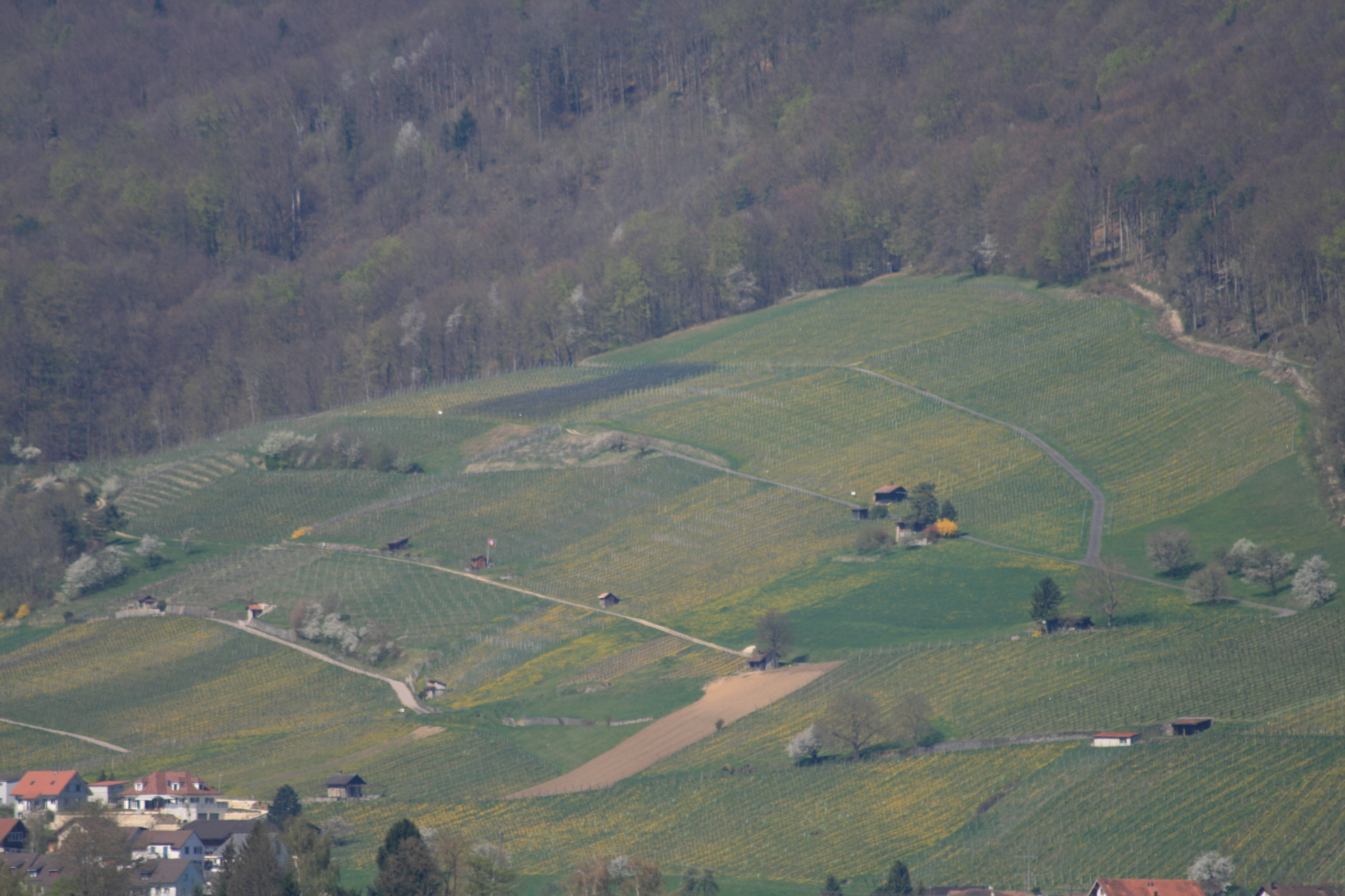 Rebberg in Schinznach-Dorf